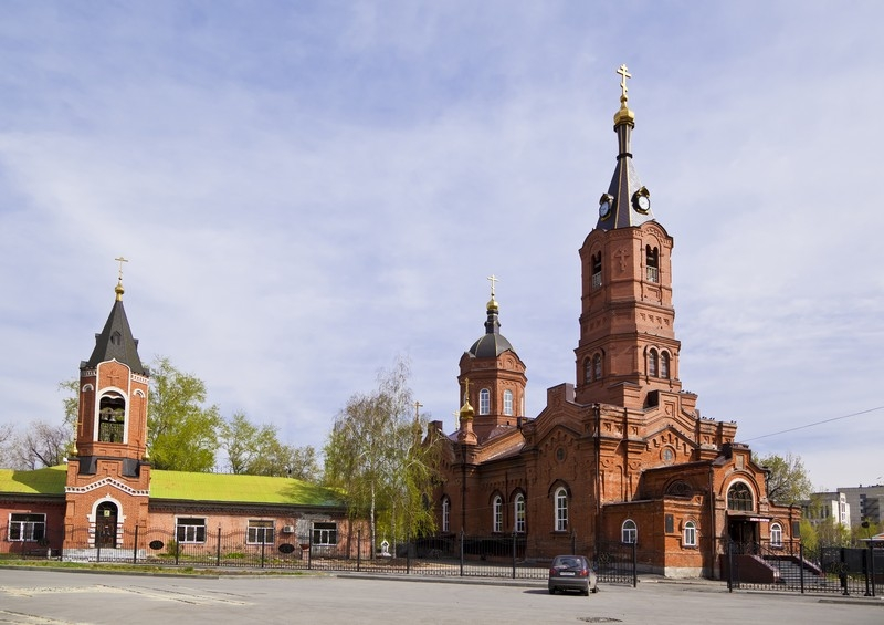 Okn-005-1